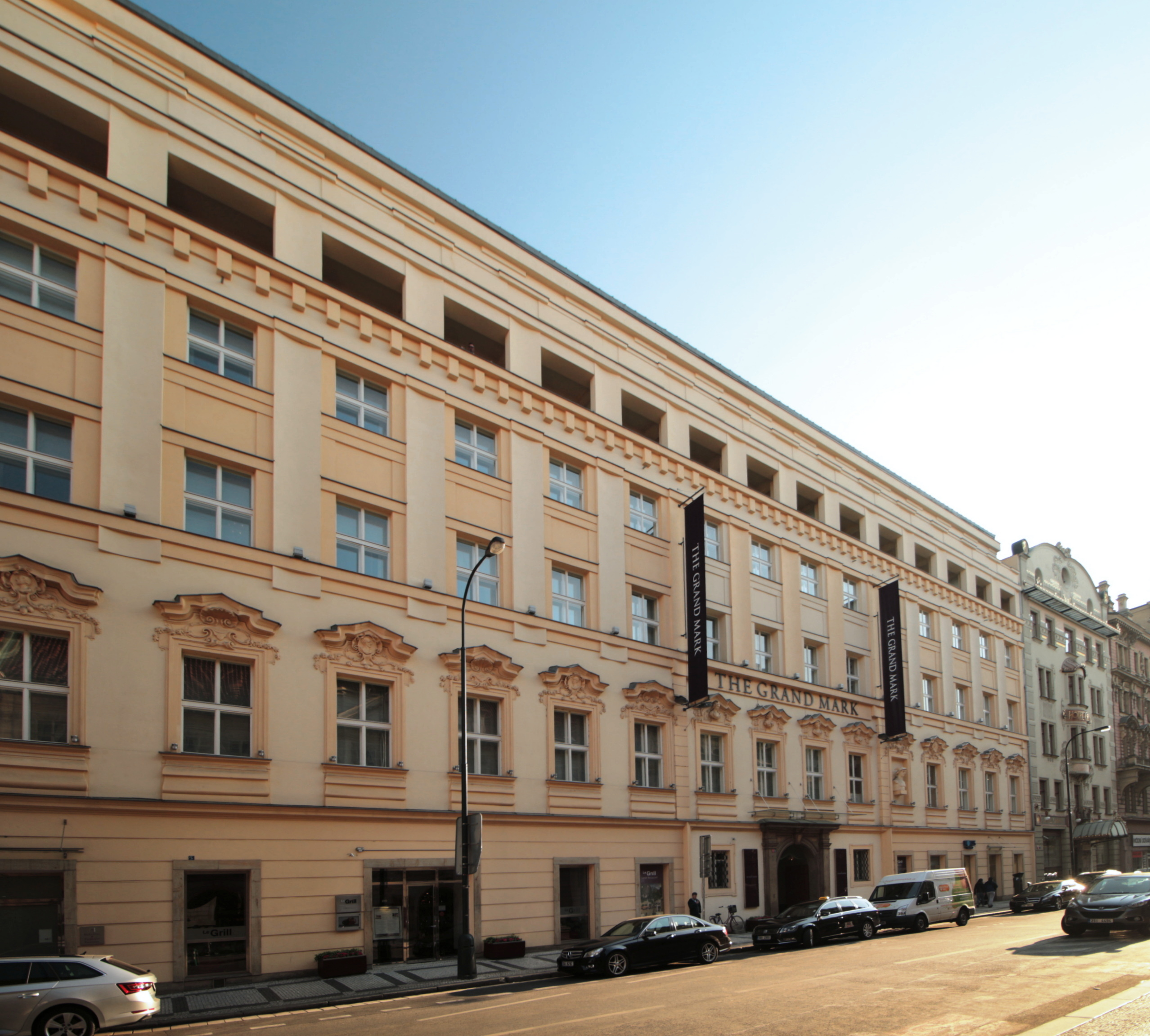 Praha-Hybernská ulice, Palác Věžníků, dnes Hotel Grand Mark